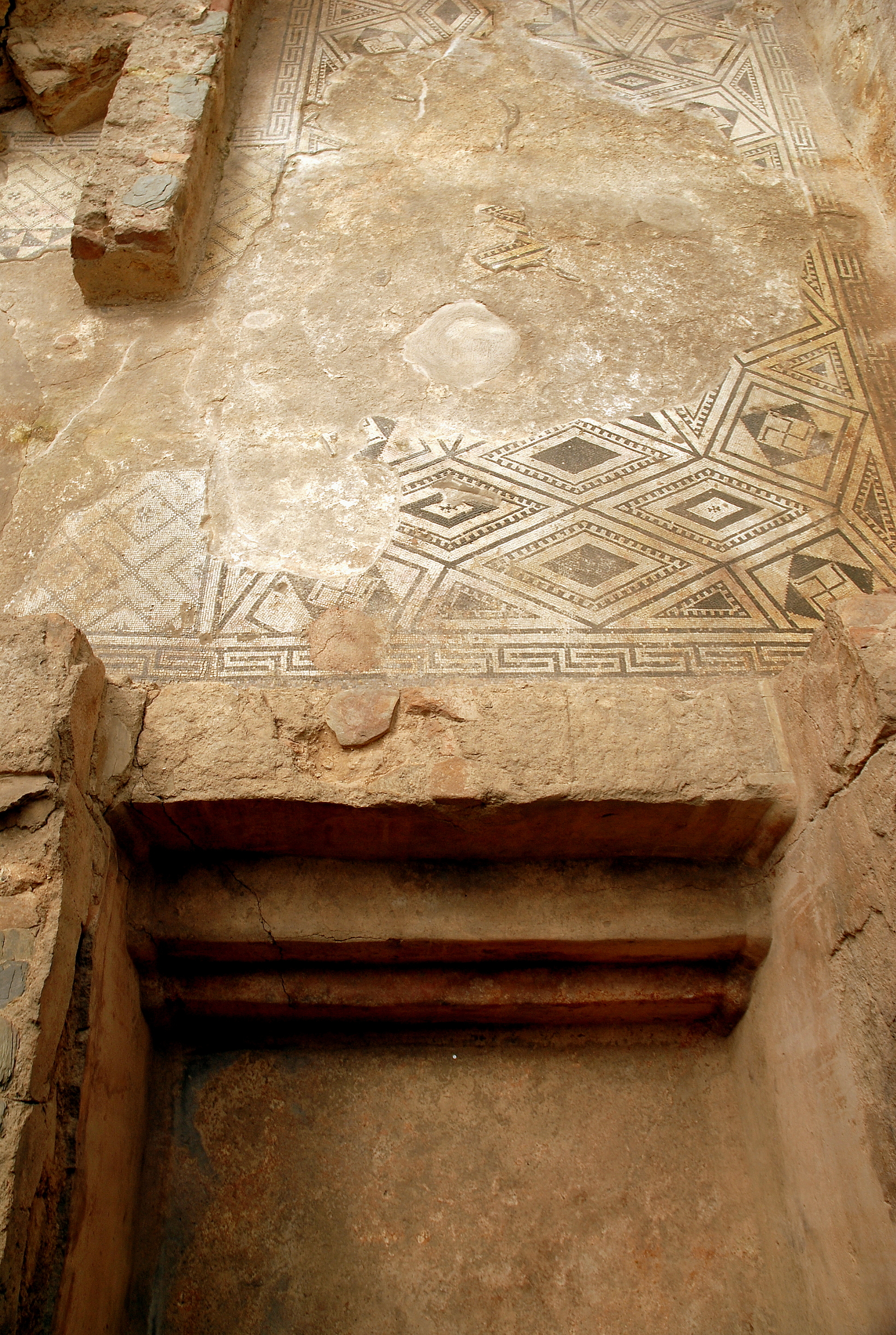 Las termas se localizaron en 1953 gracias a un documento de 1826, interpretado por el historiador santboiano Carles Martí y Villa. Ramon Mas y Campderrós inició su excavación que, un año después, continuó bajo la dirección del arqueólogo José de Calasanz Serra y Ràfols.